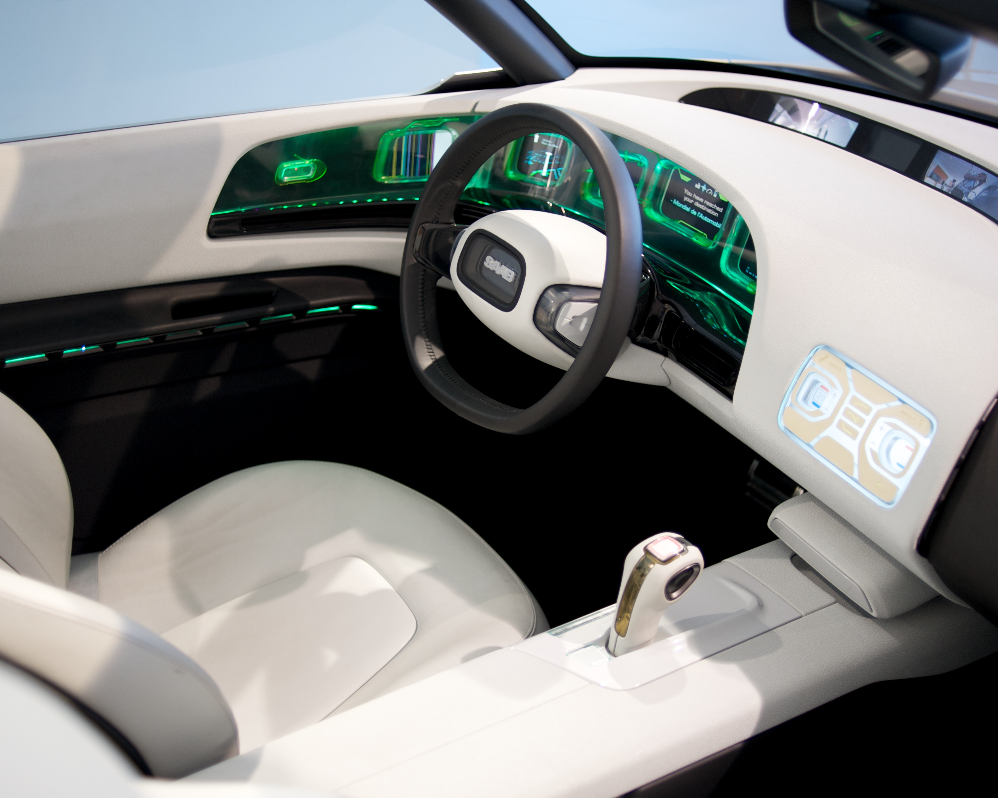 Saab 9-x